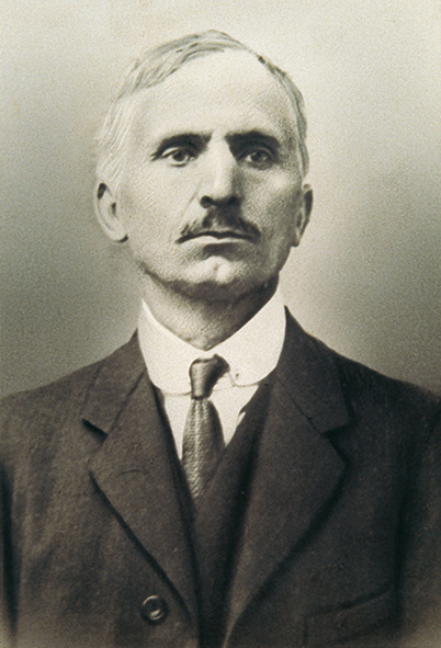 Portrait du peintre suisse Marius Borgeaud en 1899.